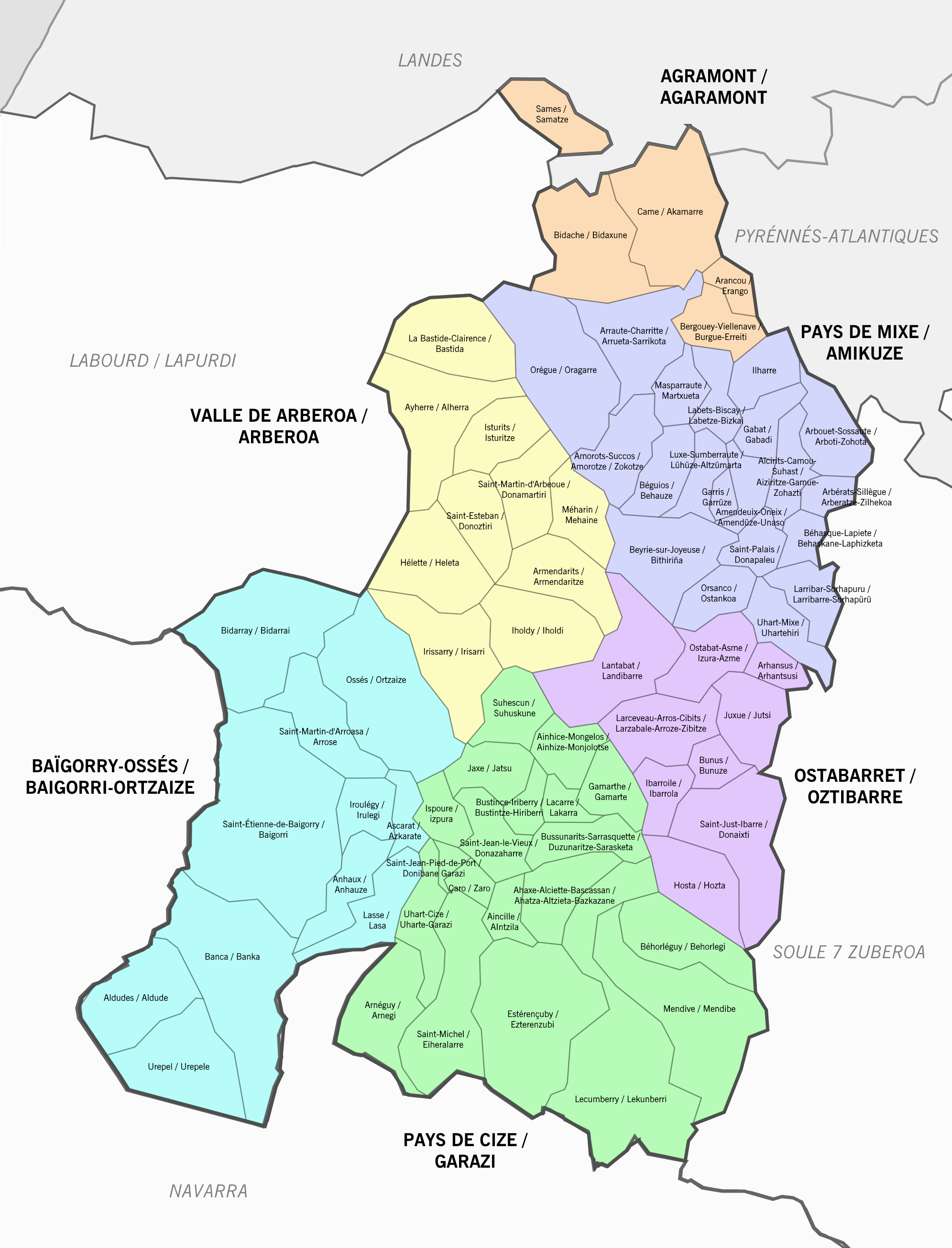 Mapa politico de la Baja Navarra